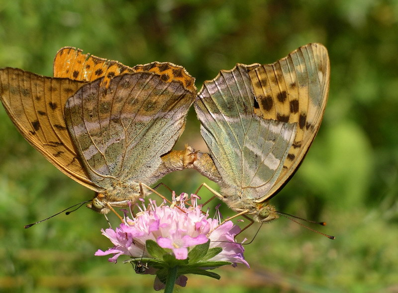 Drugių kopuliacija